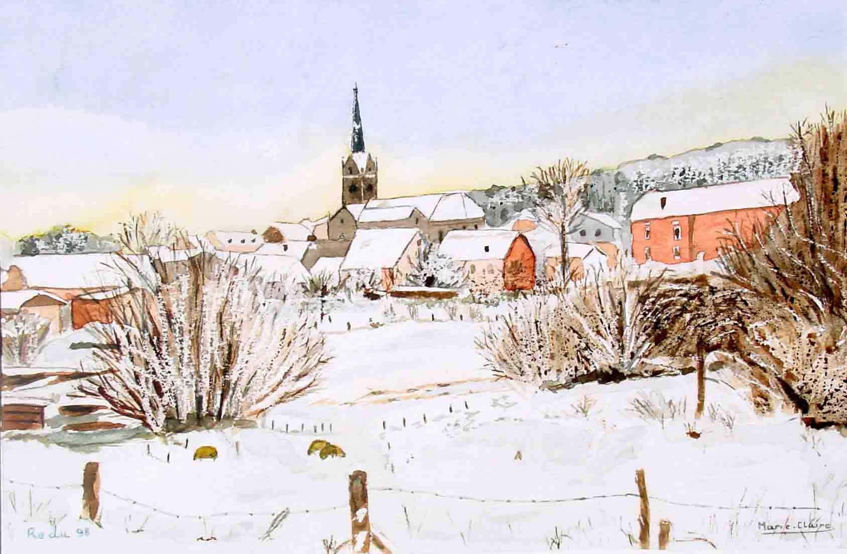 Redu, le village en hiver.